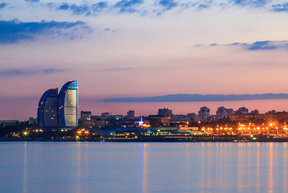 Вечерний Волгоград